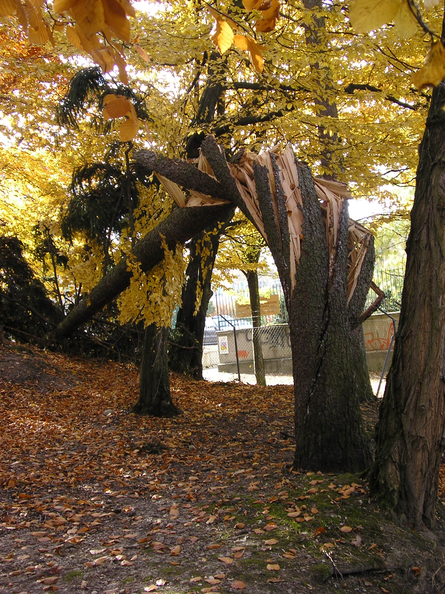 Sapin (Picea abies) tordu et couché par la bise, Genève (Bois de la Bâtie), octobre 2007